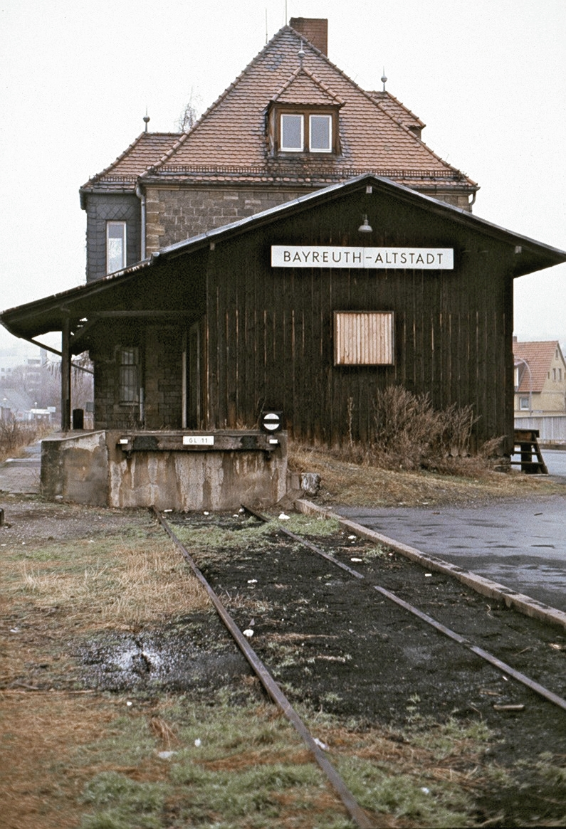 Bahnhof Bayreuth Altstadt Güterschuppen 1987